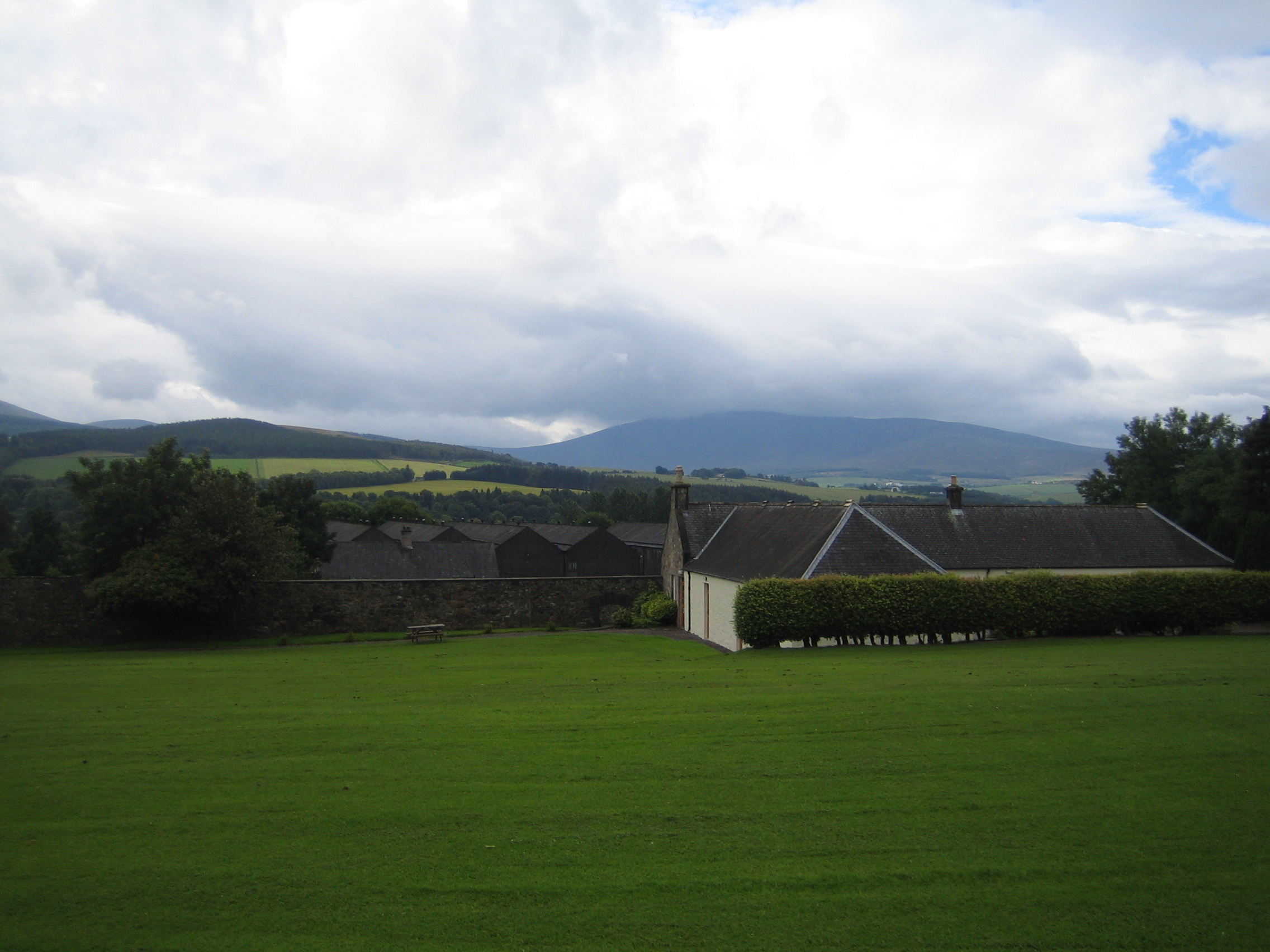 Source : Antonin MARCEL Distillerie Macallan Source Oeuvre personnelle de anton lecram aka Antonin MARCEL : juillet 2007 devant la distillerie Macallan en Ecosse